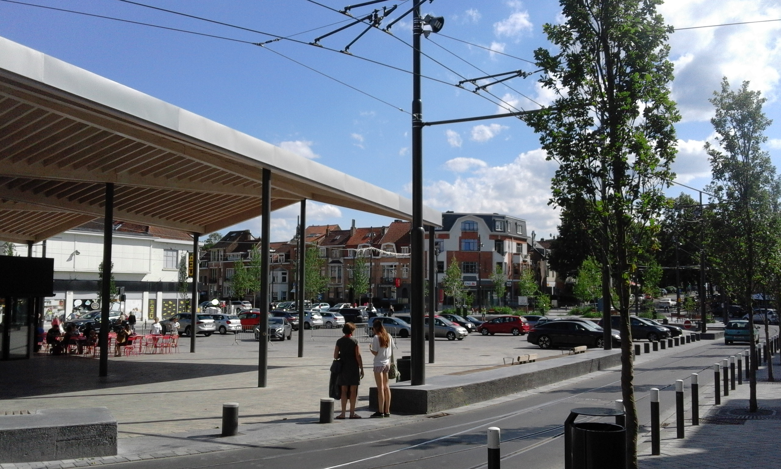 Place Dumon à Woluwe-Saint-Pierre, en Région bruxelloise, Belgique, en juillet 2018